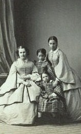 Анастасия Николаевна Мальцова, ур. княжна Урусова (1820—1894) и ее дети.